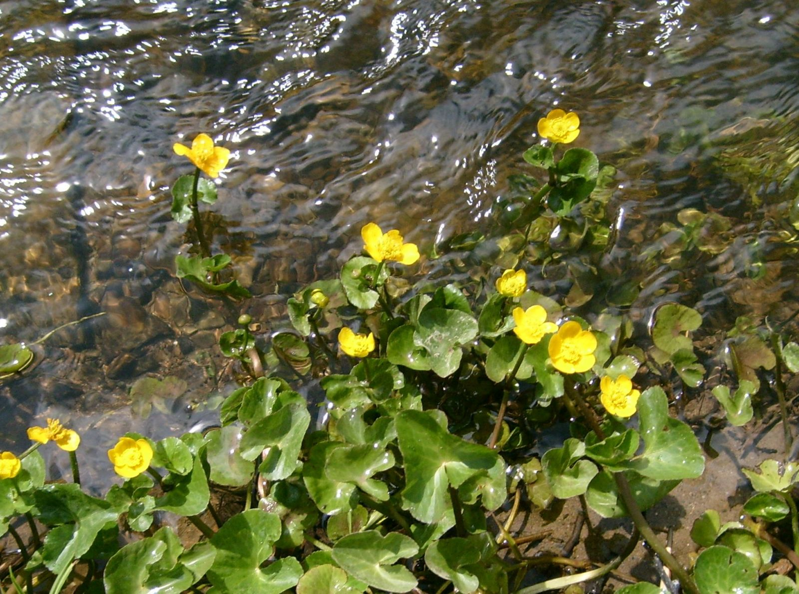 Äerblumm - Caltha palustris L., Ufer vun der Our bei der Tëntesmillen, 1. Mee 2008